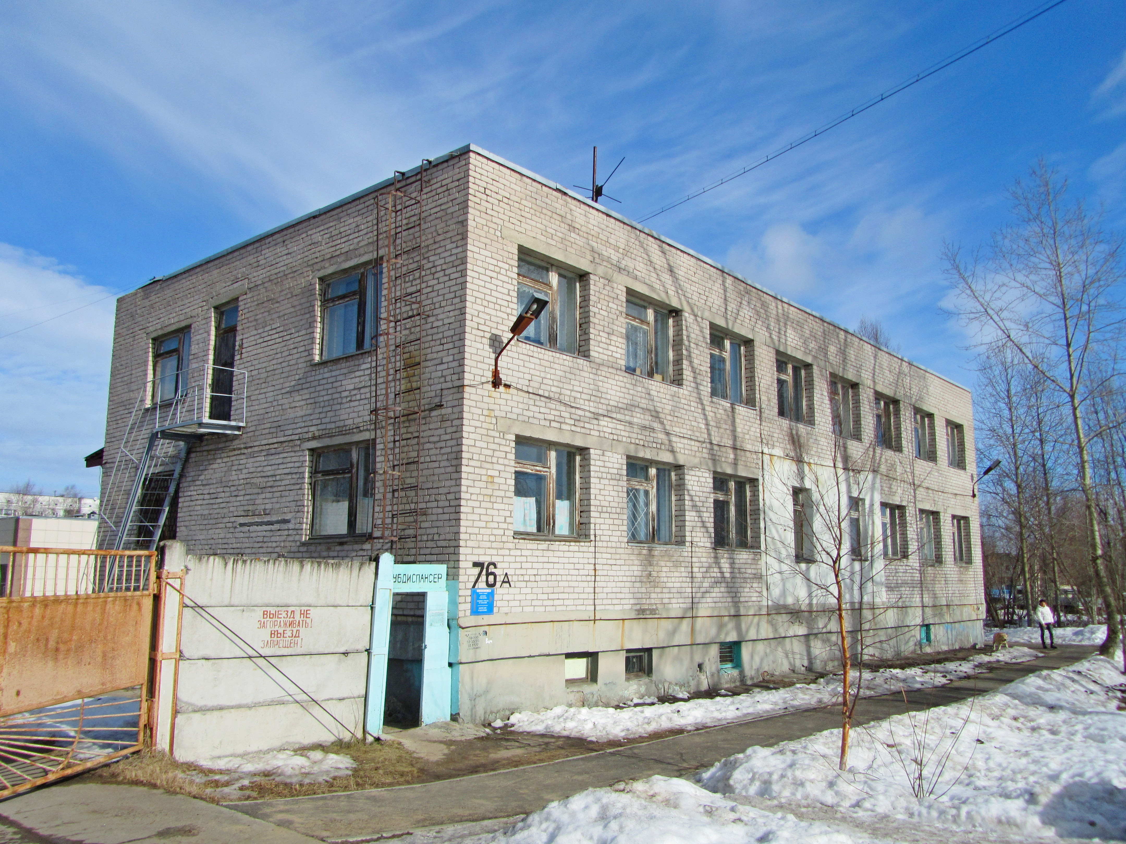 Дом №76А. Проспект Беломорский. Северодвинск. Туберкулёзный диспансер. Фото А. Щекинова